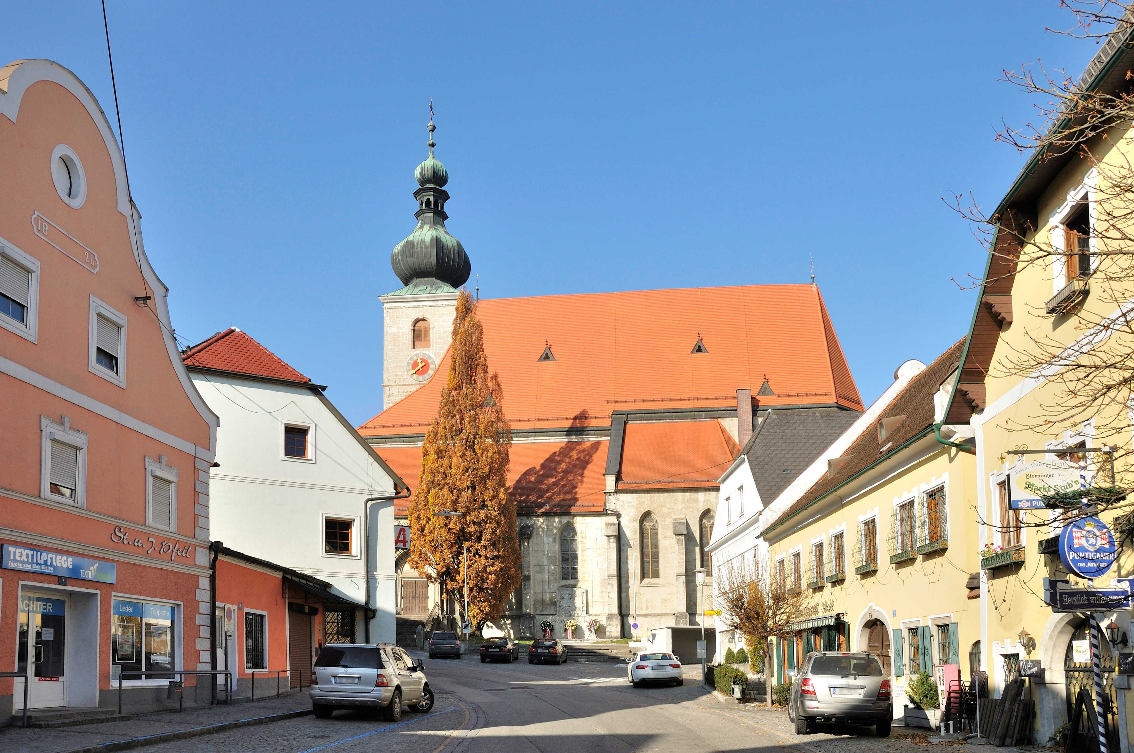 Kath. Pfarrkirche hl. Stephan, Sierning, Oberösterreich